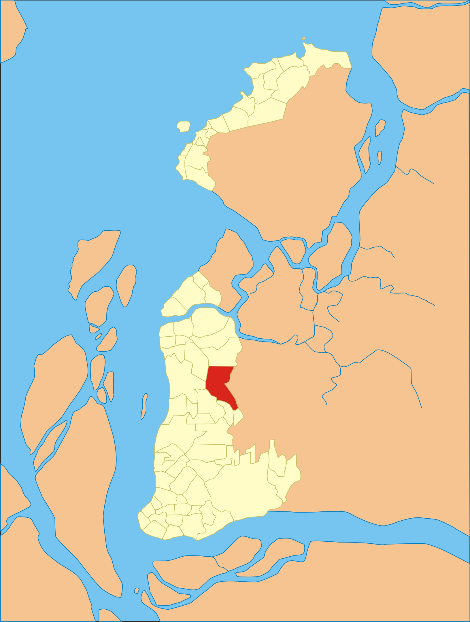 Localização do bairro em Belém do Pará